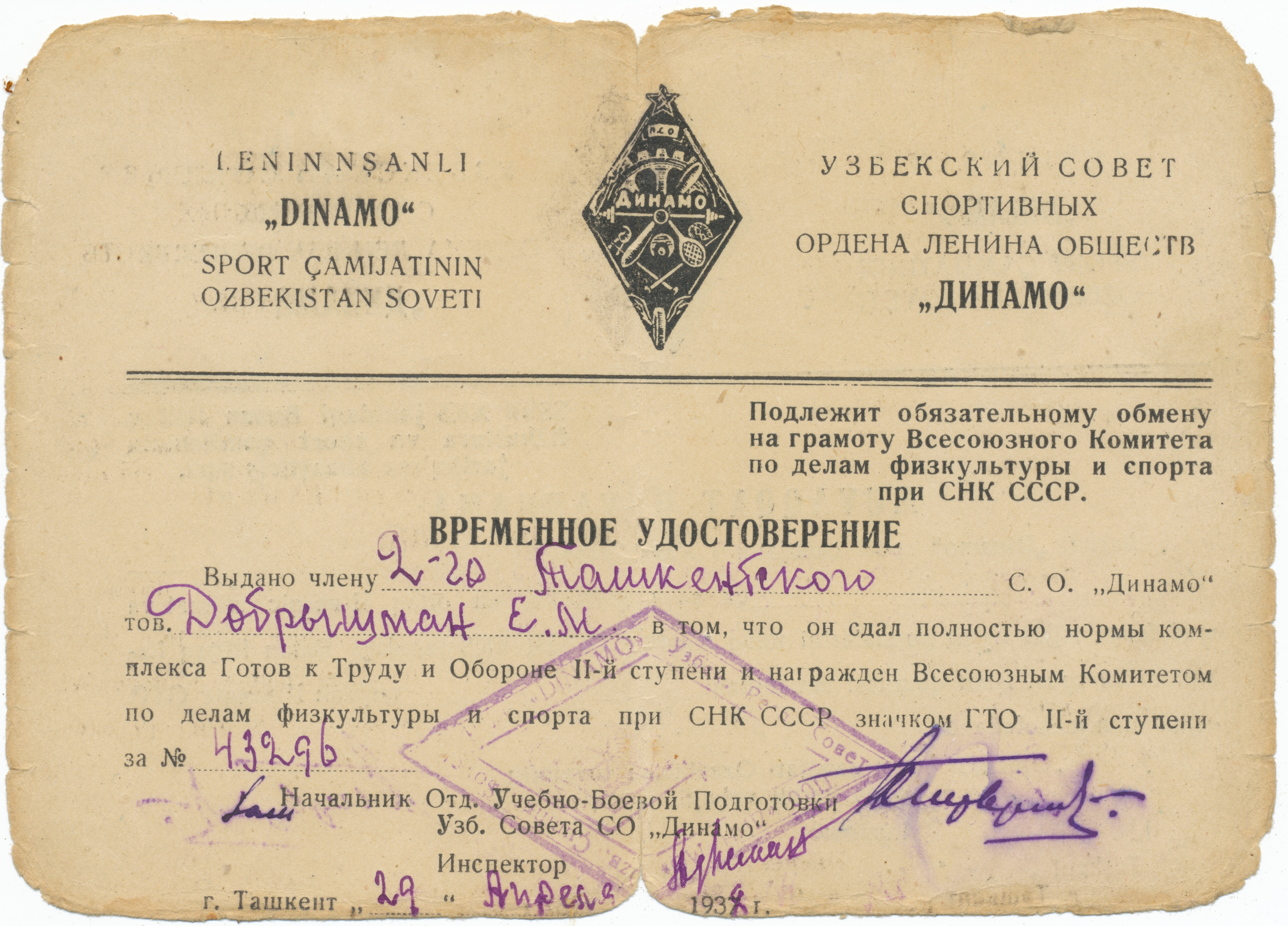 Документы, выданные Е. М. Добрышману (1919-2016) в том, что он сдал нормы ГТО СССР в 1938 году (Ташкент).